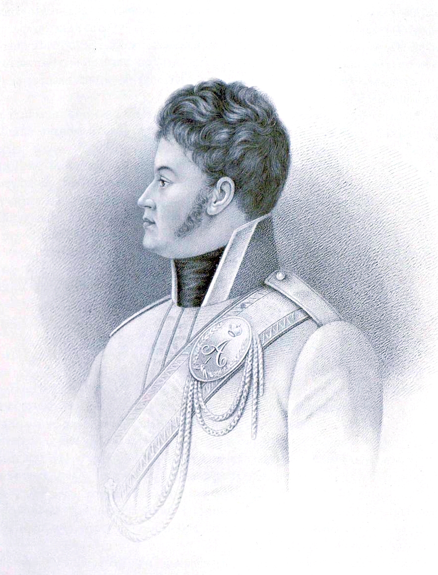 Павел Васильевич Голенищев-Кутузов, командир Кавалергардского полка с 16 марта 1801 по 16 мая 1803. Портрет с акварели